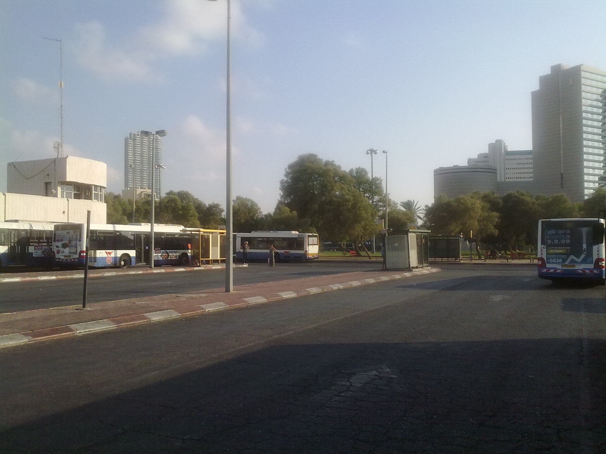 מסוף כרמלית וגן הכובשים. ברקע, מלונות דן פנורמה ודיוויד אינטרקונטיננטל (מימין), ומגדל נווה צדק (משמאל).